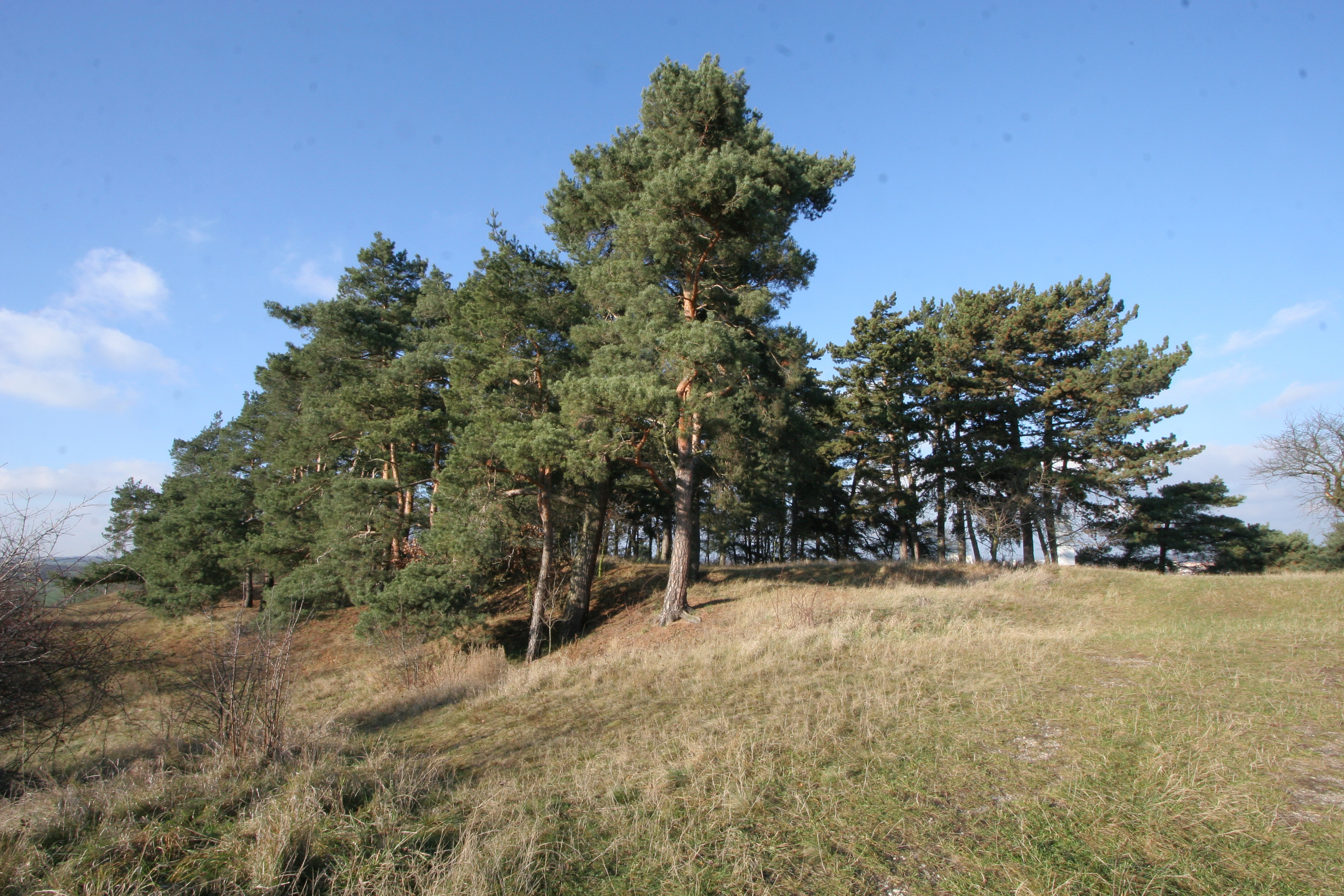 Pohřebiště, archeologické stopy (Dobřichov), Dobřichov